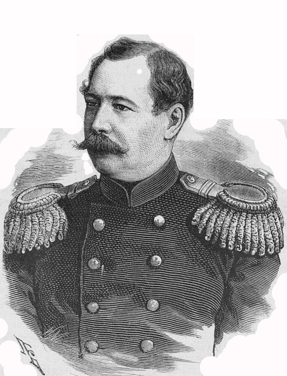 Генерал Татищев Леонид Александрович, 1878